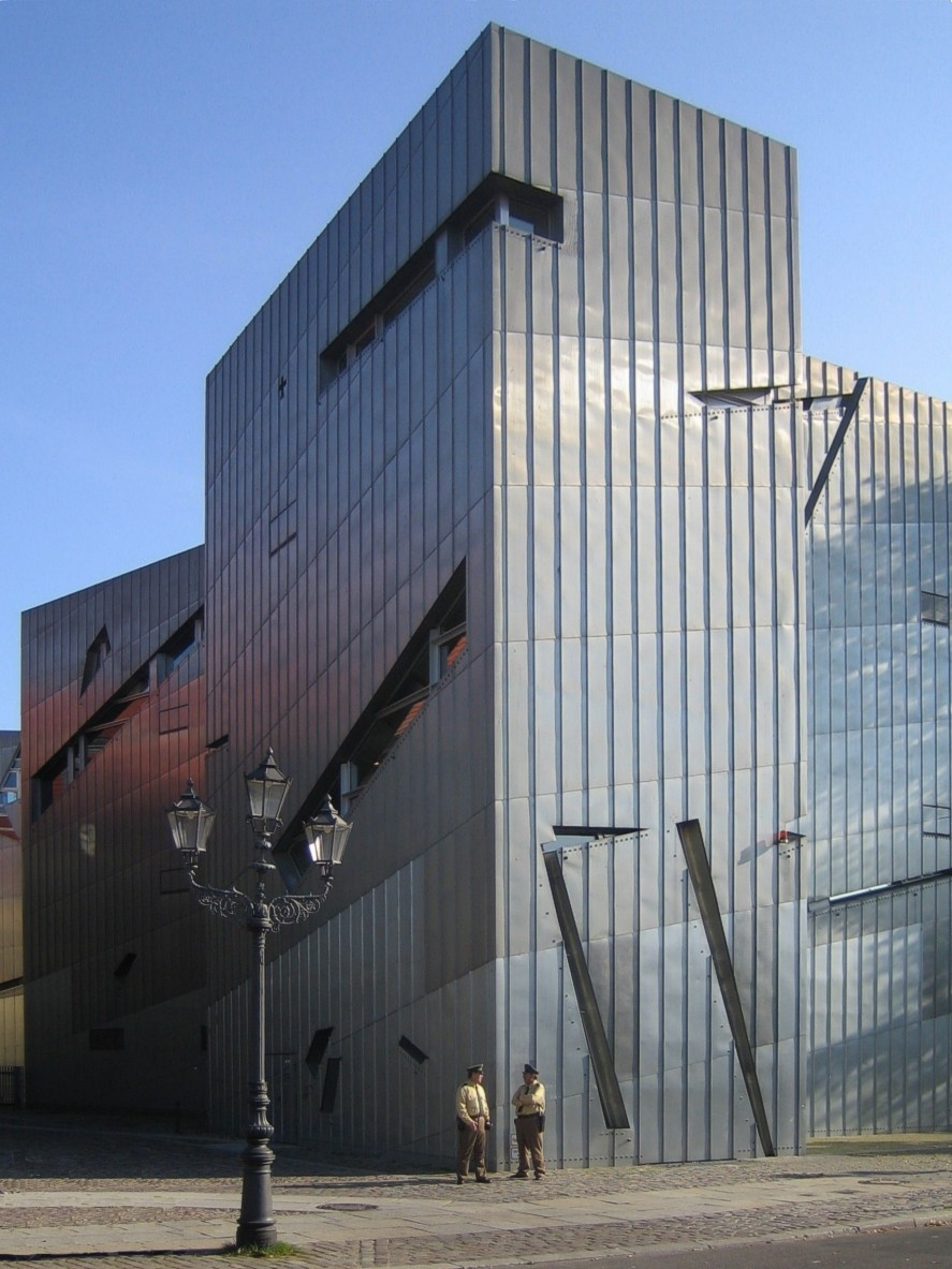 Berlin-Kreuzberg. Jüdisches Museum, Neubau von Daniel Libeskind, Teilansicht. Eigenes Foto, 2005. Fotograf: Manfred Brückels.